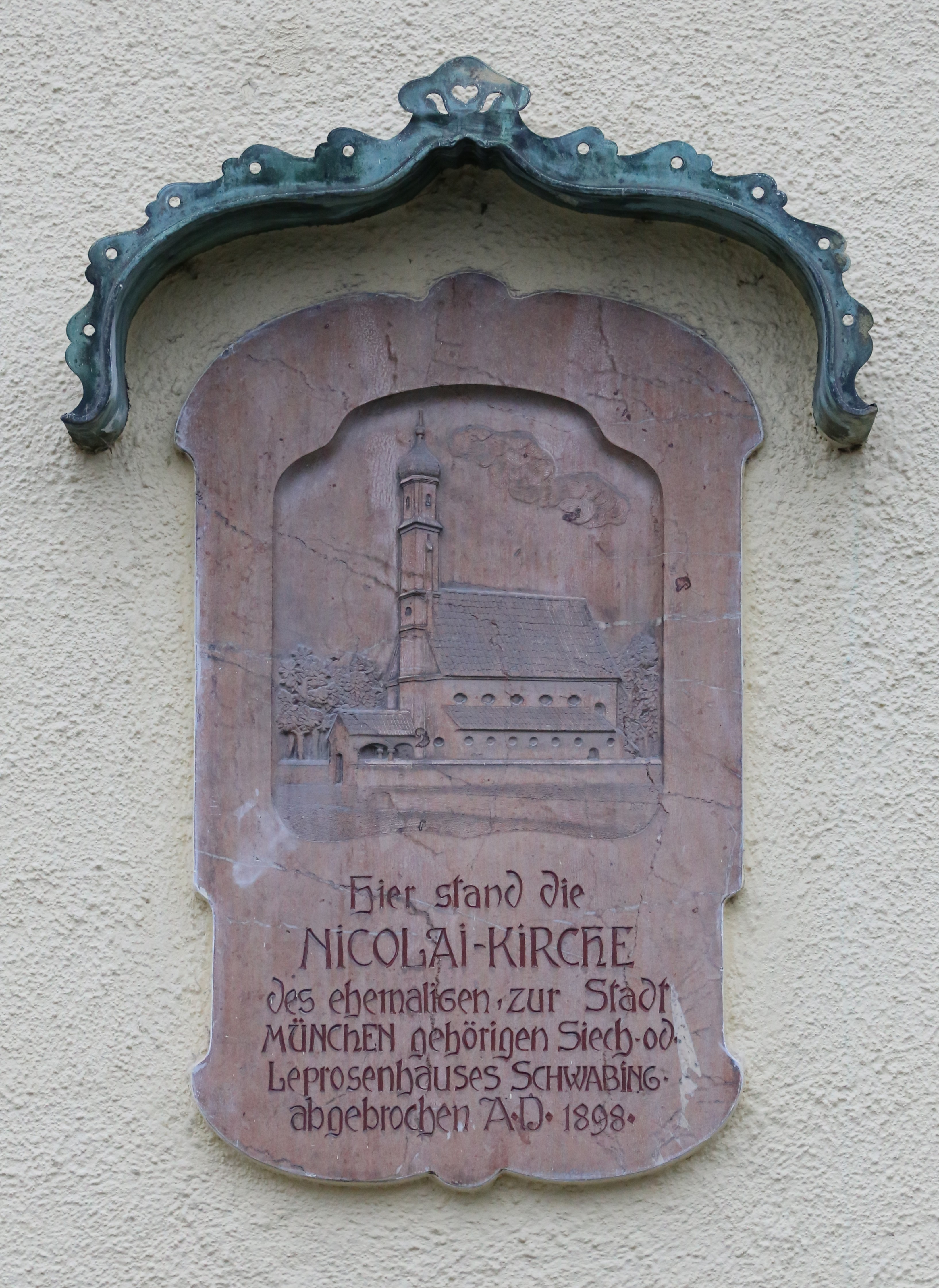 Gedenktafel zur Erinnerung an die Nikolai-Kirche, Nikolaistr. 4, München